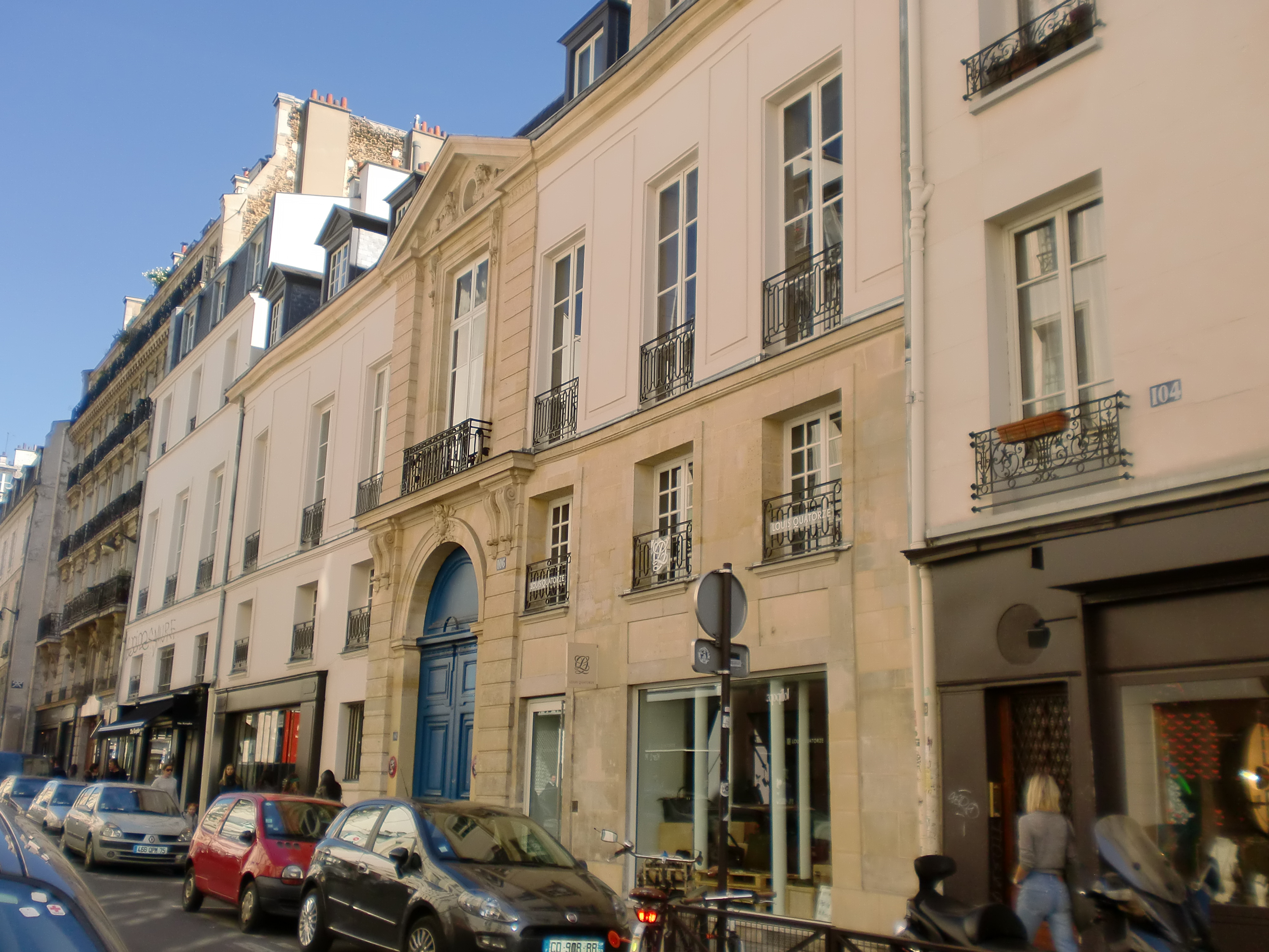 Hôtel Mégret de Sérilly, 106 rue Vieille du Temple 75003 Paris. .